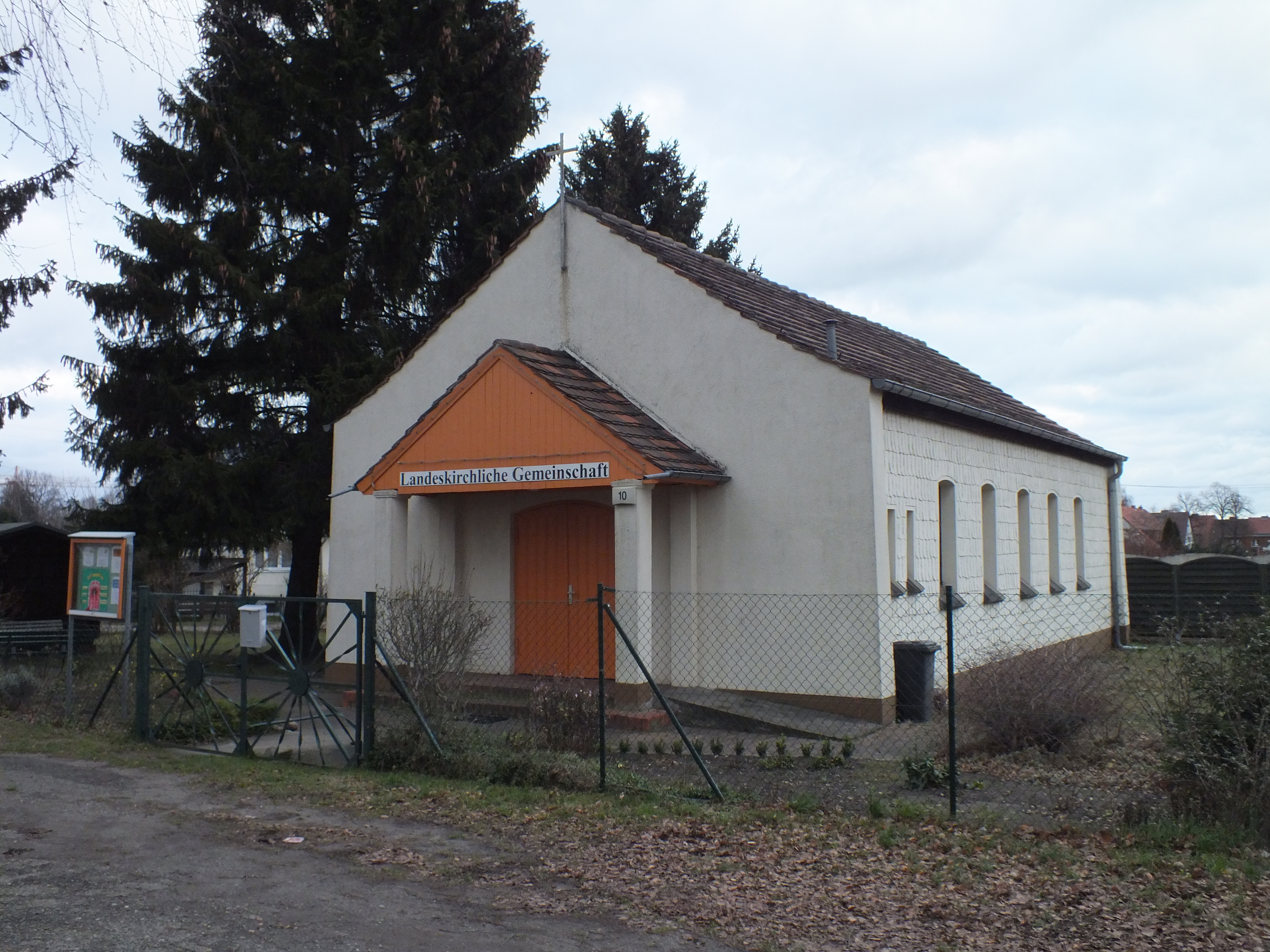 Philippus-Kapelle, Bezirk Lichtenberg von Berlin; Berlin-alt-Hohenschönhausen